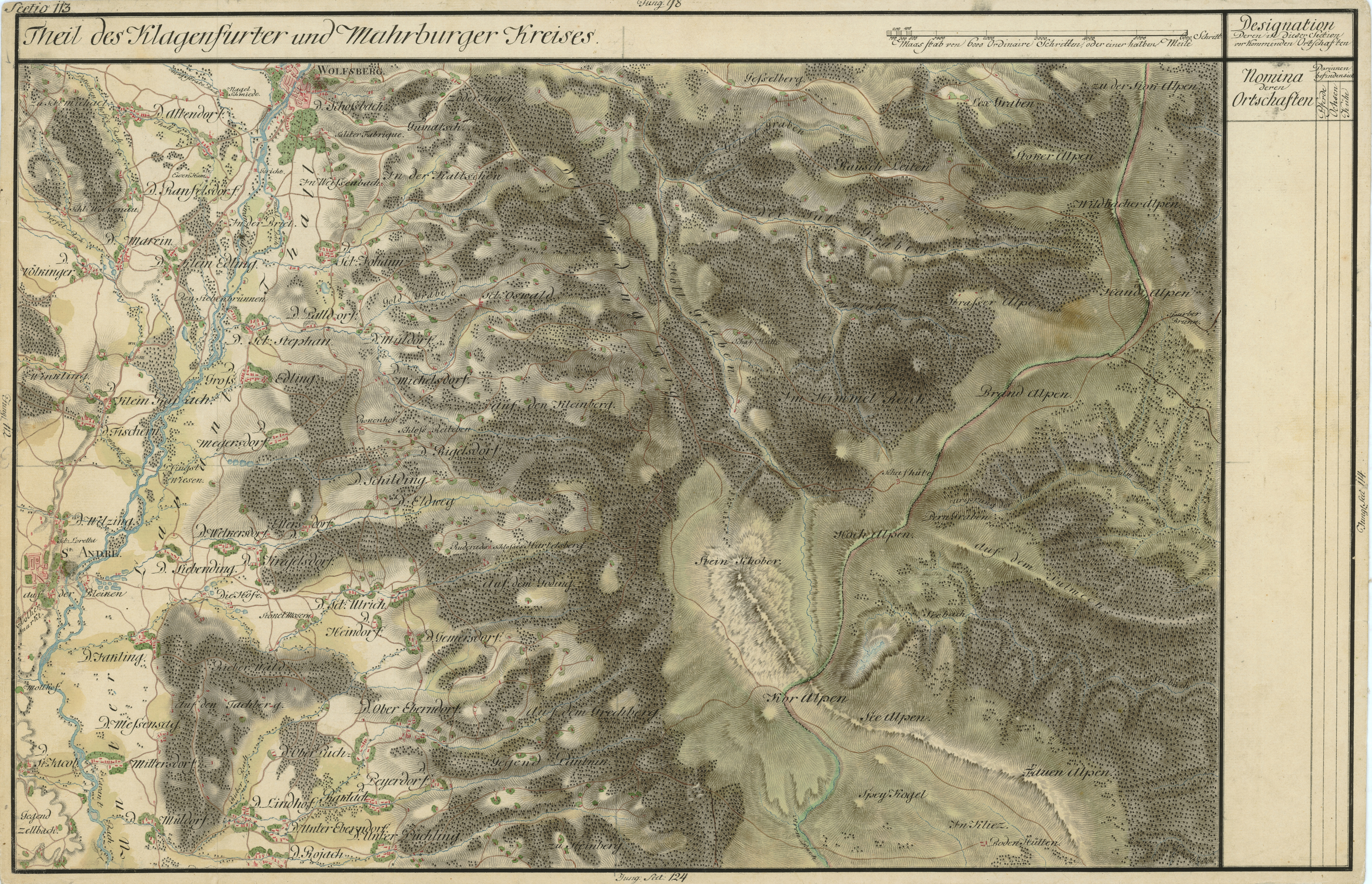 historische Landkarte section 113 Josephinische Landesaufnahme: südliche Koralm, Weinebene, Speikkogel, unteres Lavanttal in: Kärnten und Steiermark, Österreich